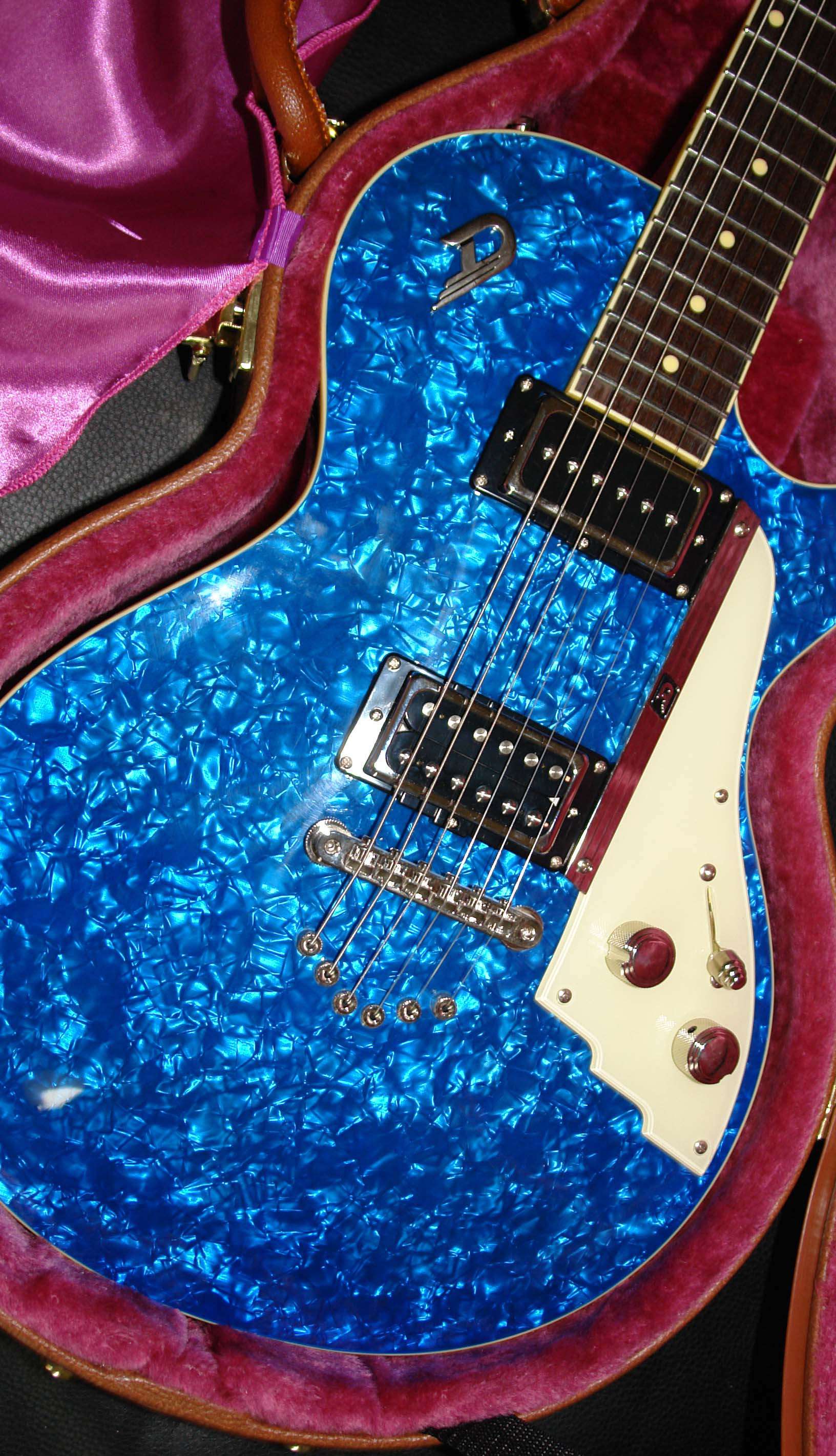 Duesenberg 49er Blue Pearl